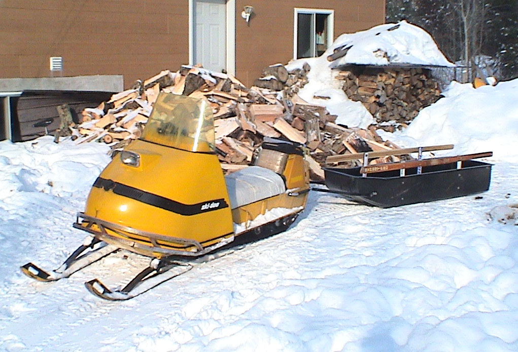 Ski-doo Olympique 12-3 1969 au travail